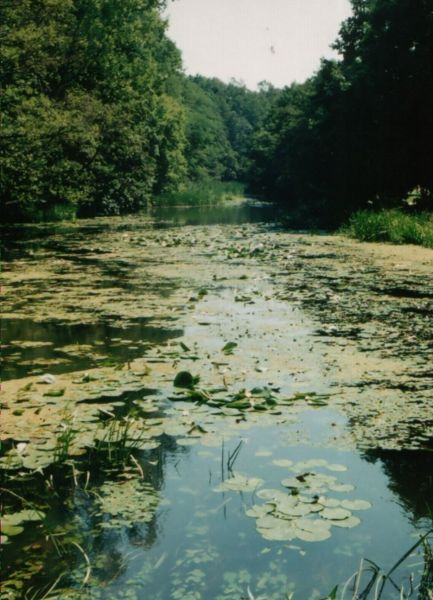 A_Túr_folyó